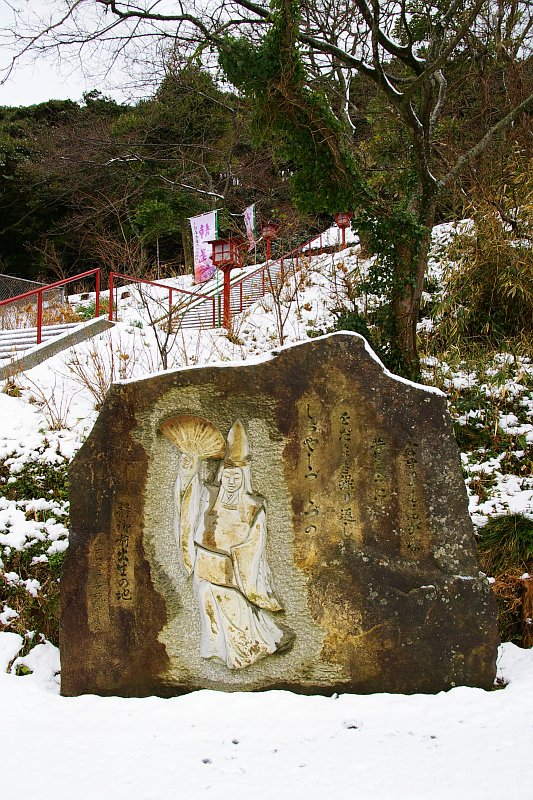 Shizuka Jinjya (Shrine) monument, KyoTango-shi Amino, Kyoto, Japan.